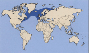 Поширення сьомги, або атлантичного лосося.